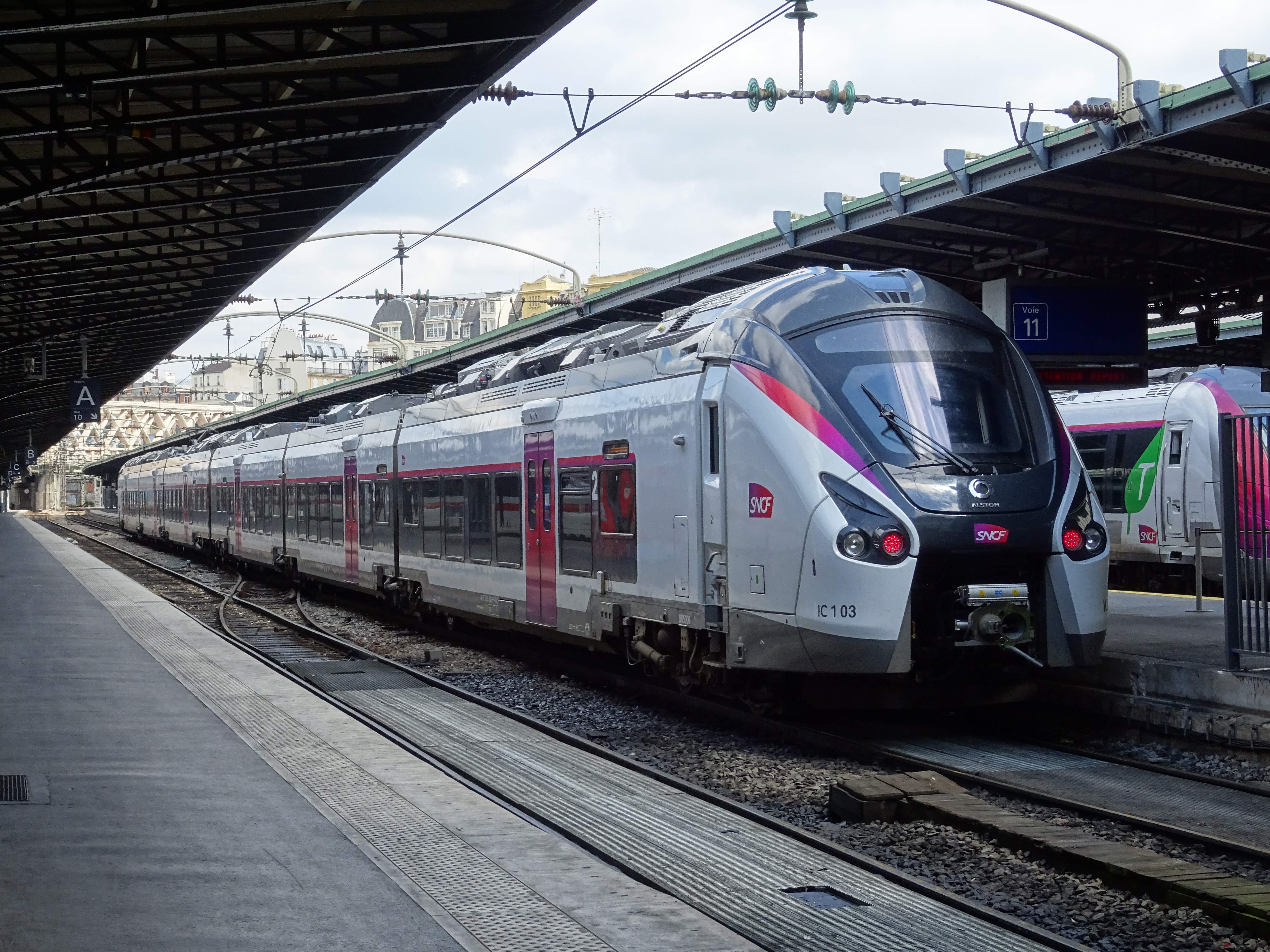 Coradia Liner en gare de Paris Est